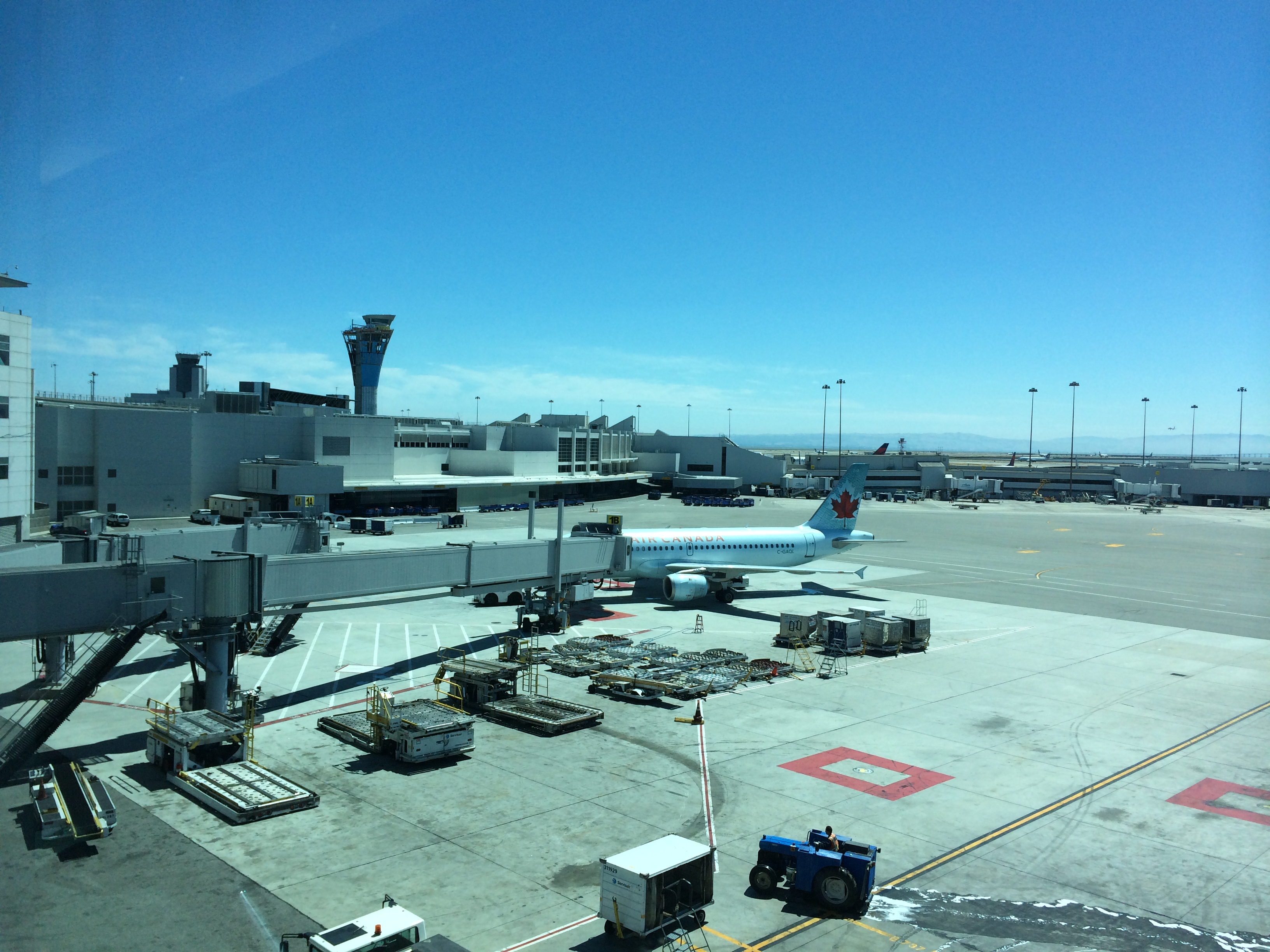 Avión de Air Canada en el Aeropuerto Internacional de San Francisco.